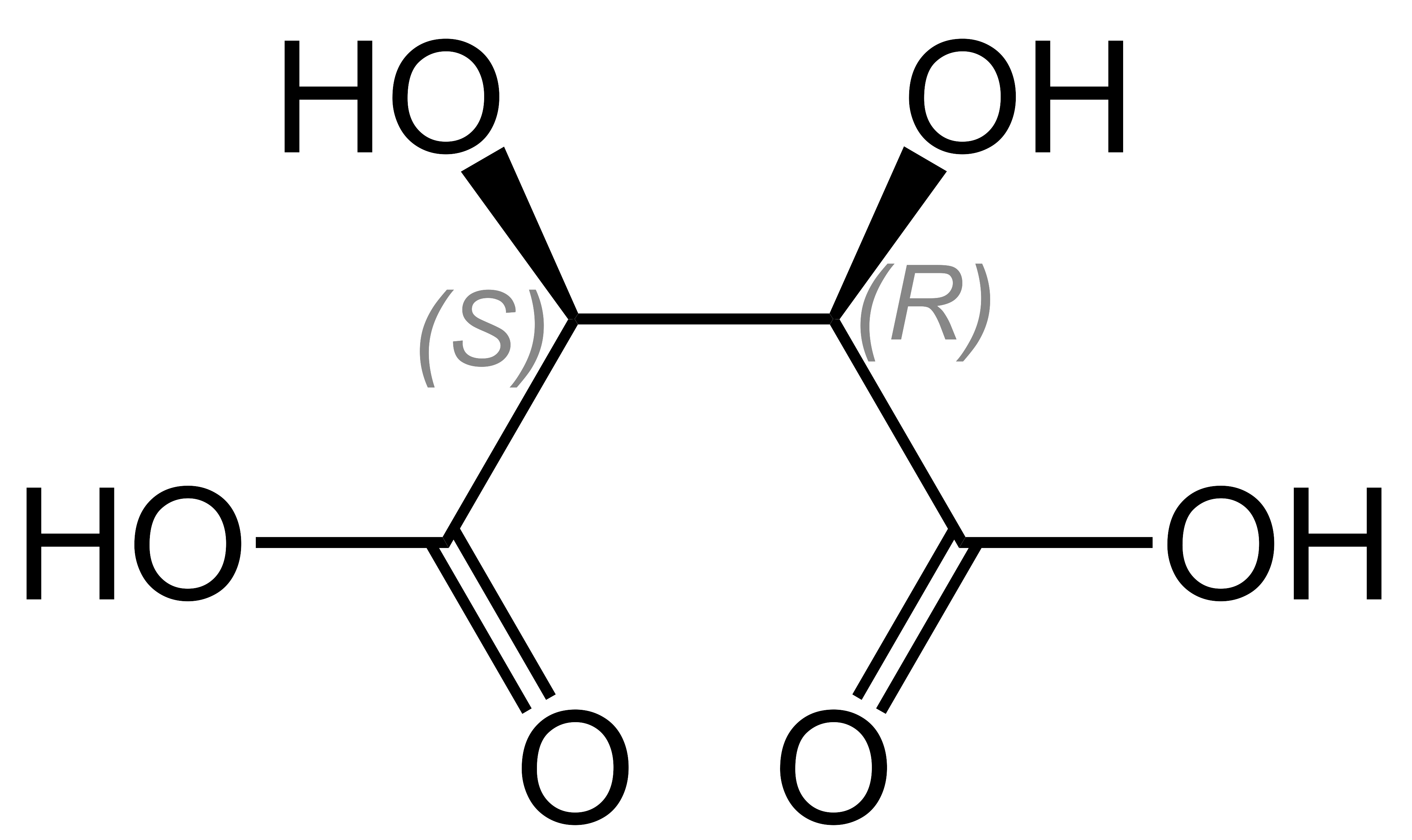 meso-Weinsäure